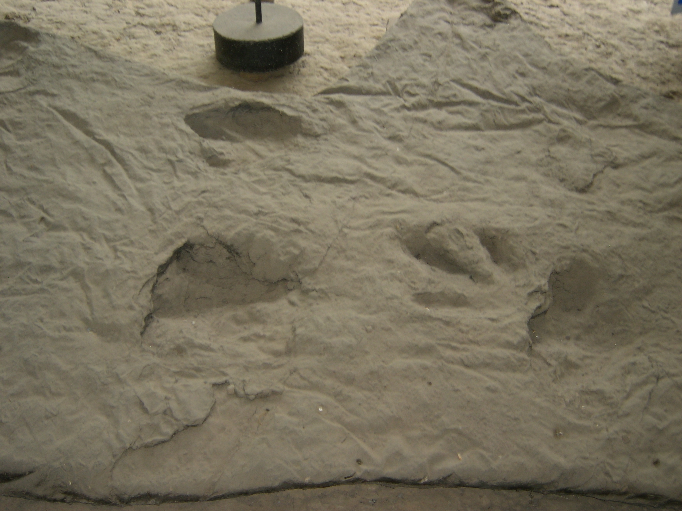 Trittsiegel von Saurier in Dinosaurierpark Münchehagen.